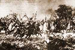 Spotkanie Tuhaj-beja z Chmielnickim pod Korsuniem